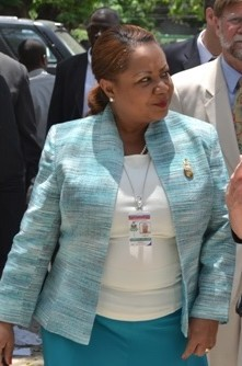 Florence Duperval Guillaume, ministra de Haití